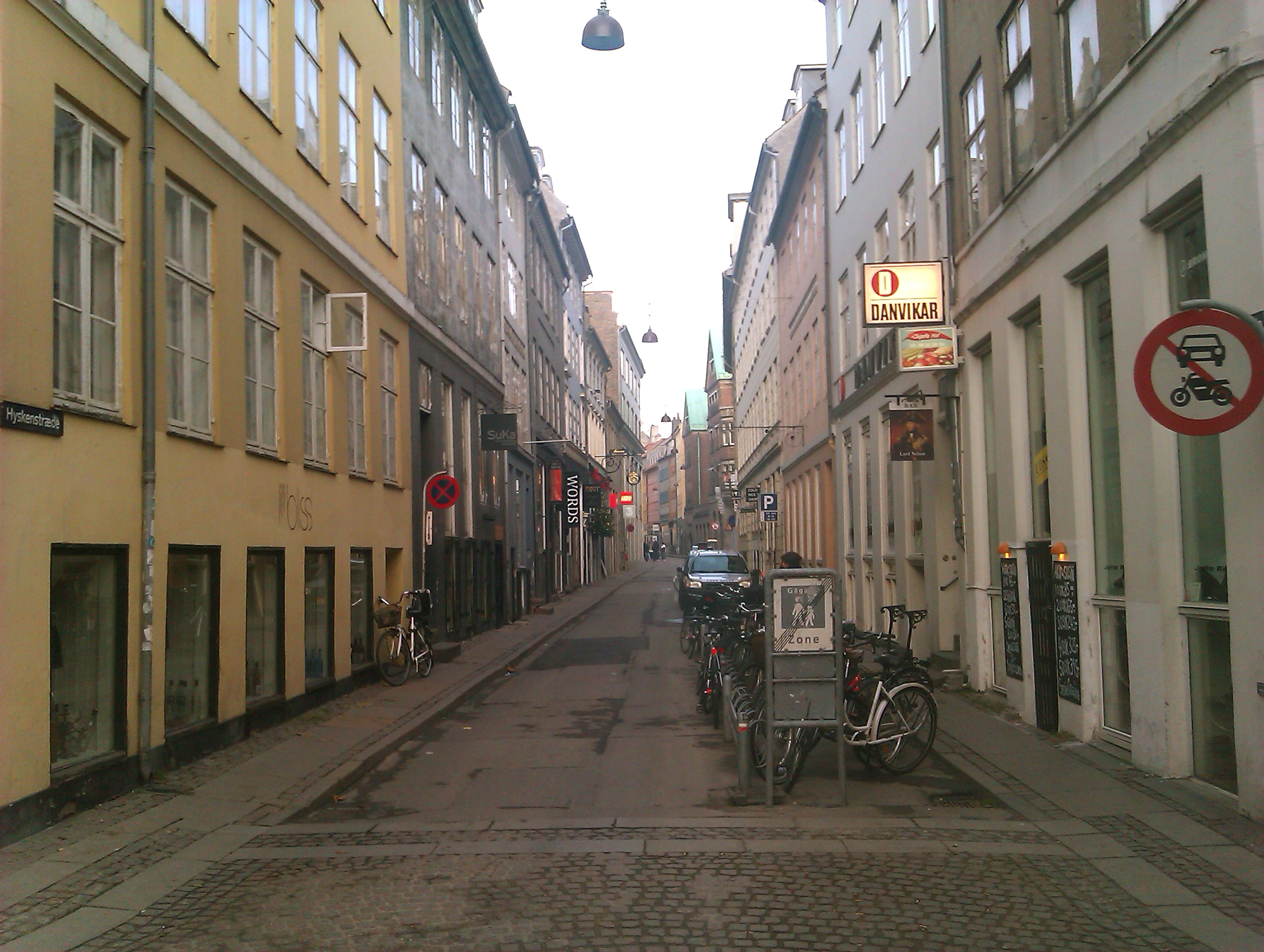 Hyskenstræde i København